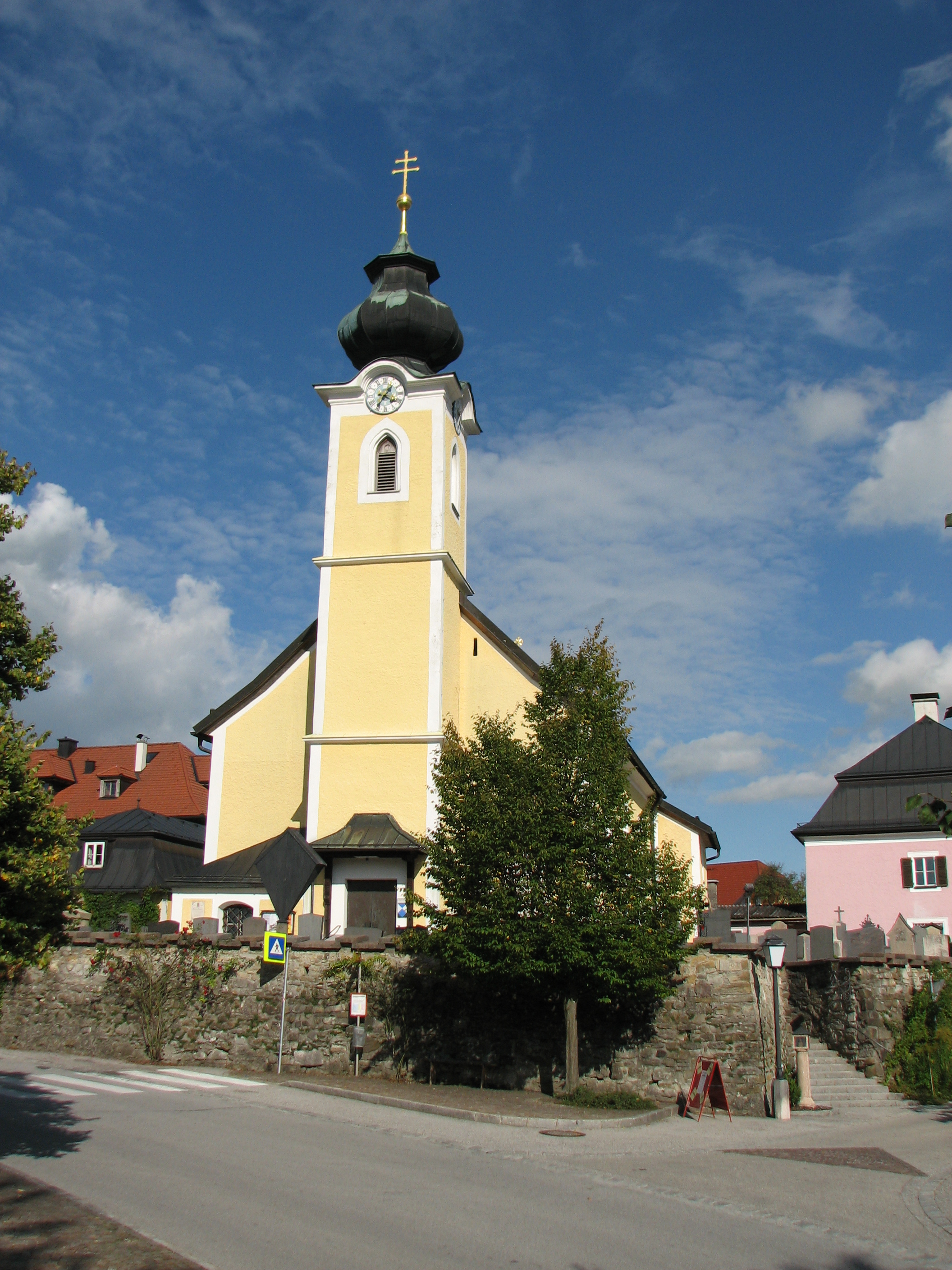 Kath. Pfarrkirche hll. Bartholomäus und Vitus